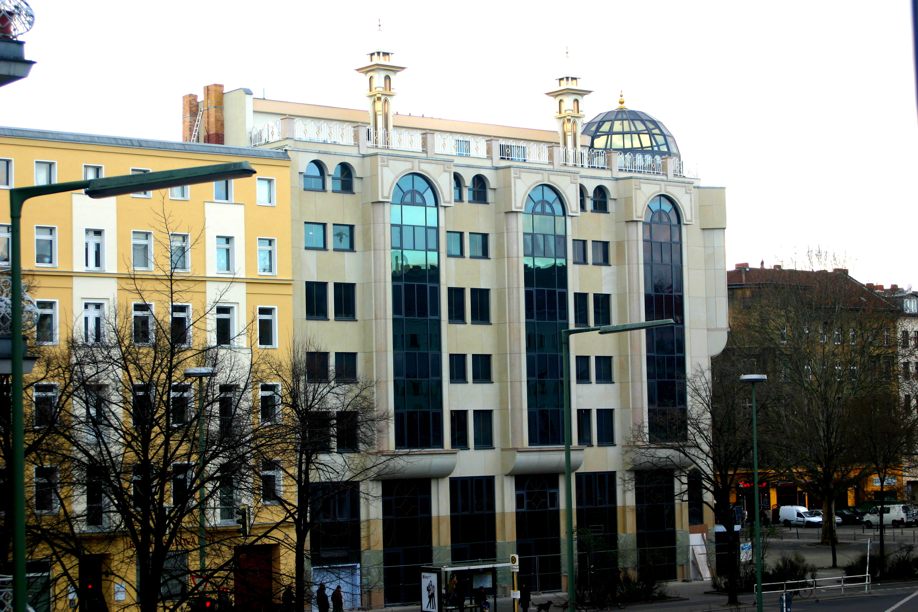 Omar ibn Al Khattab Moschee, Berlin Kreuzberg, im Februar 2008 - noch in Bau / Omar ibn Al Khattab mosque, Berlin Kreuzberg, february 2008 - still under construction